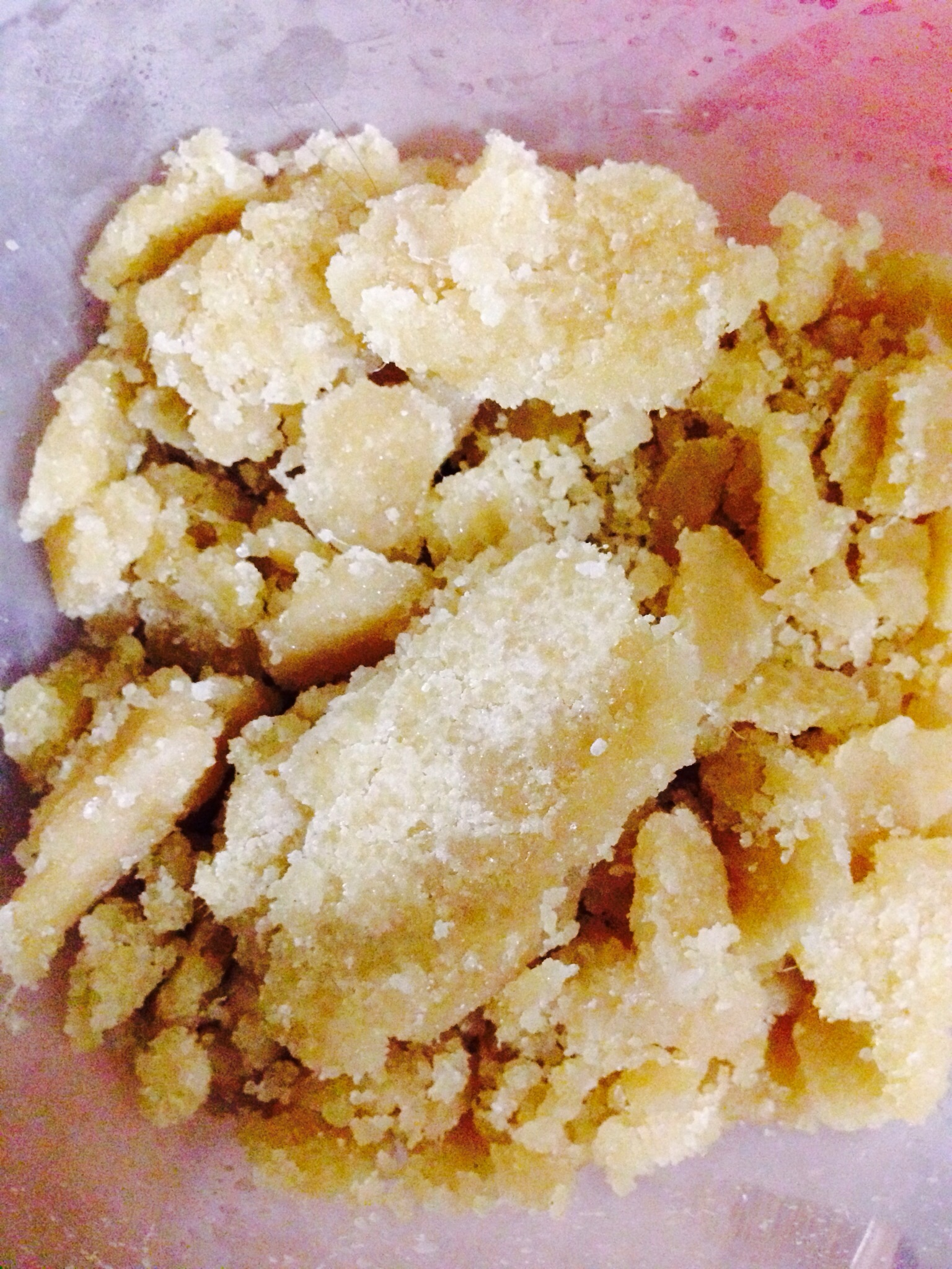 Allam murabba